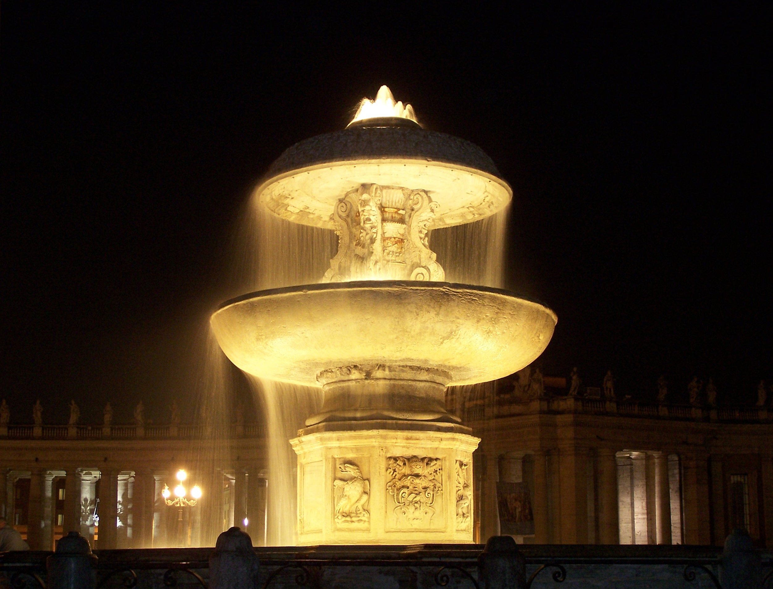 Italia, Roma, Piazza S. Pitero Fontana del Carlo Maderno 1613